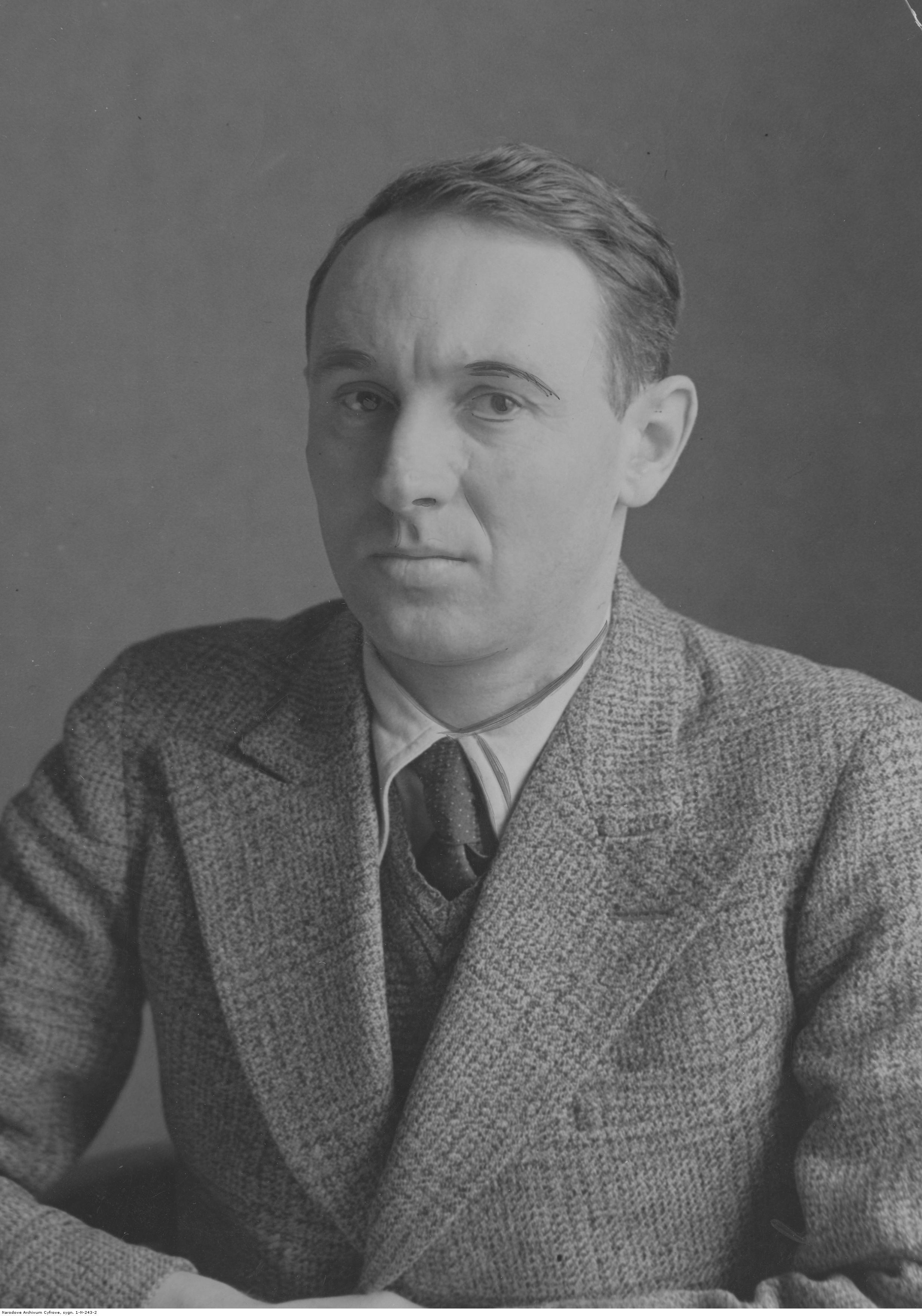 Konstanty Jodko-Narkiewicz